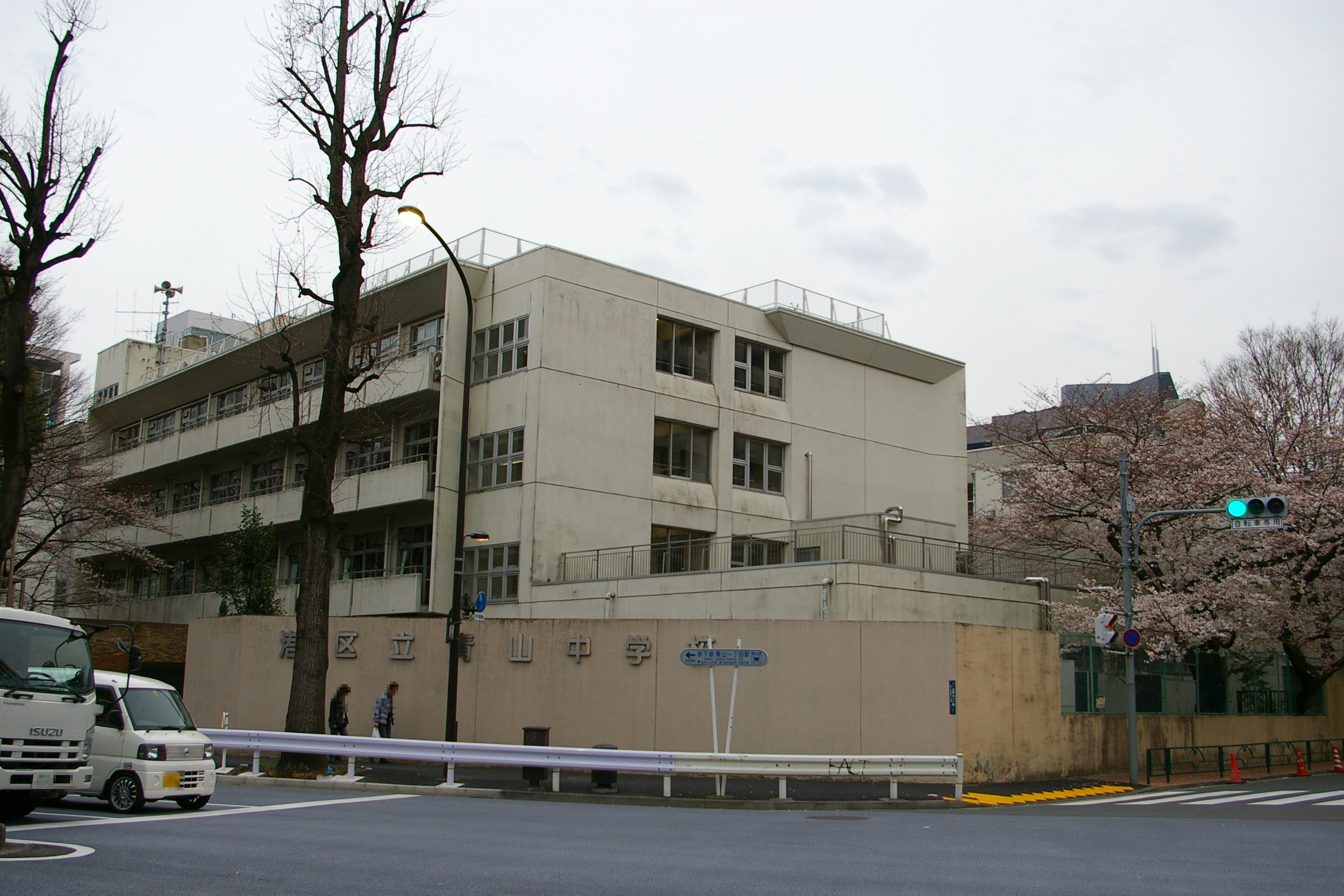 港区立青山中学校